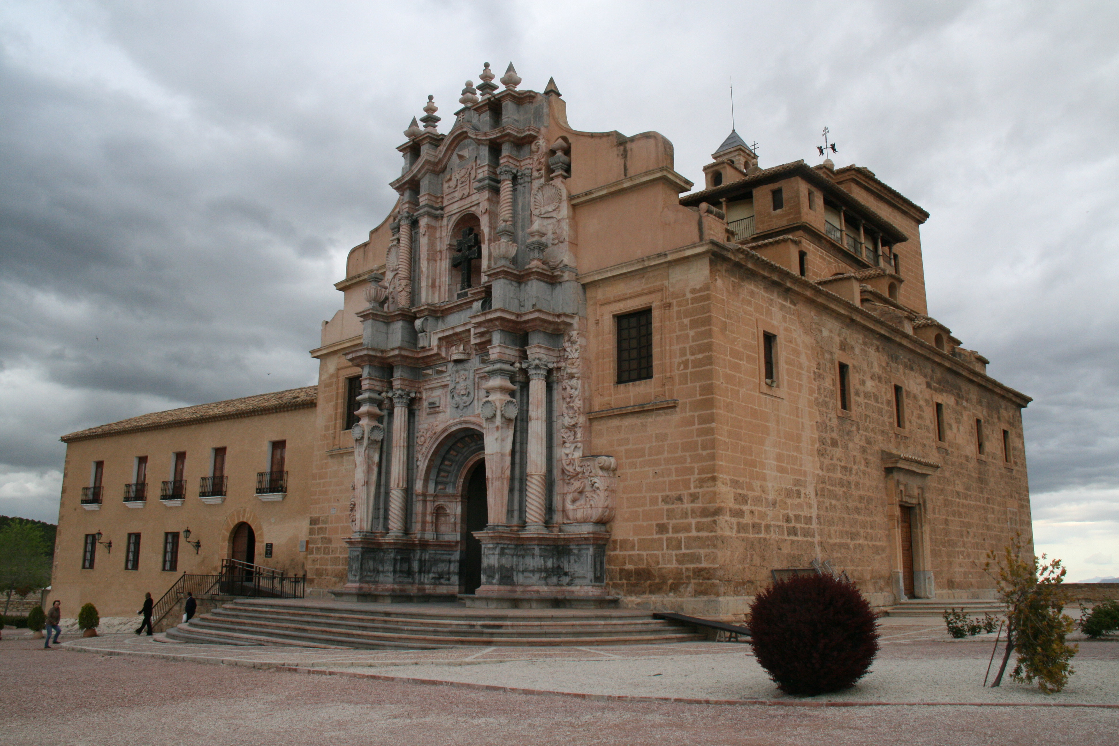 Santuario de Caravaca -Murcia